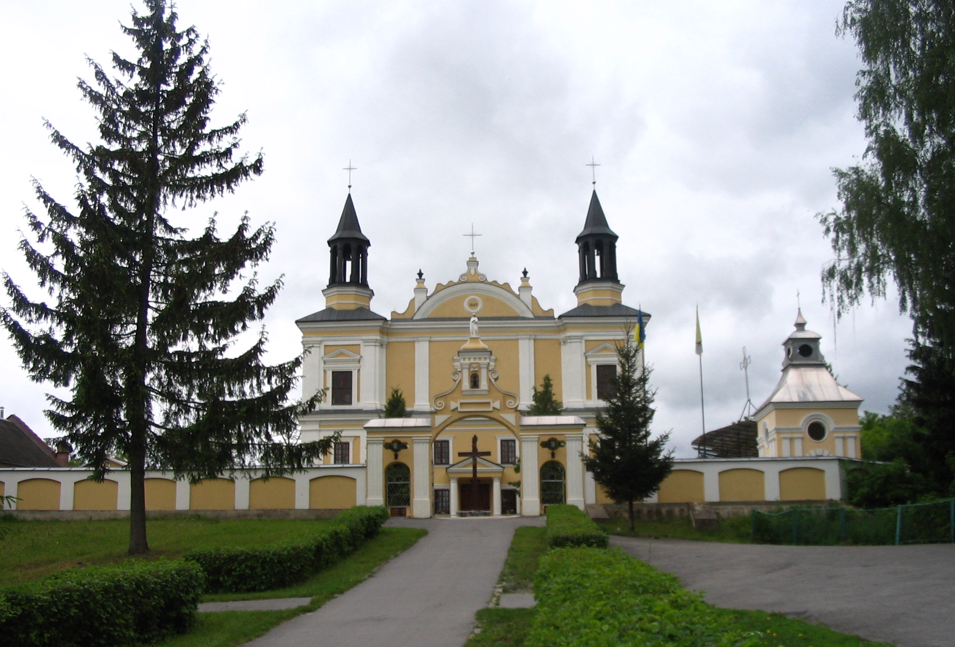 м. Полонне. Костел св. Ганни